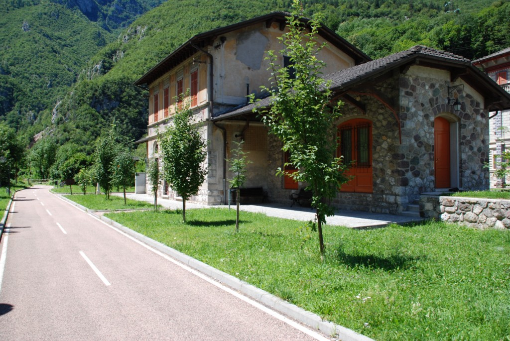 Ex-stazione ferroviaria di Lenna